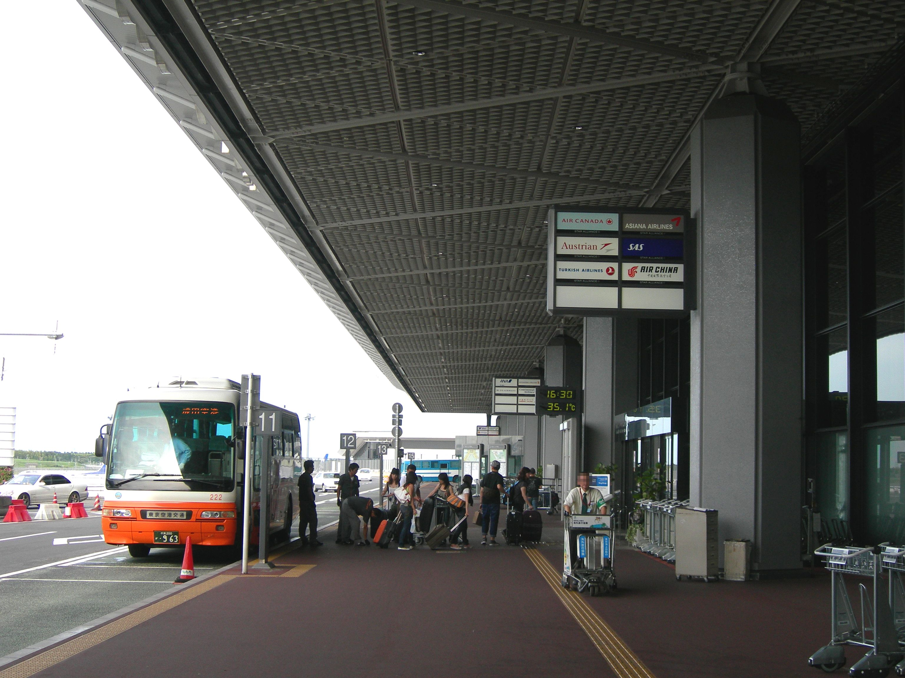 成田空港南ウイングでリムジンバスから下車する旅行者たち